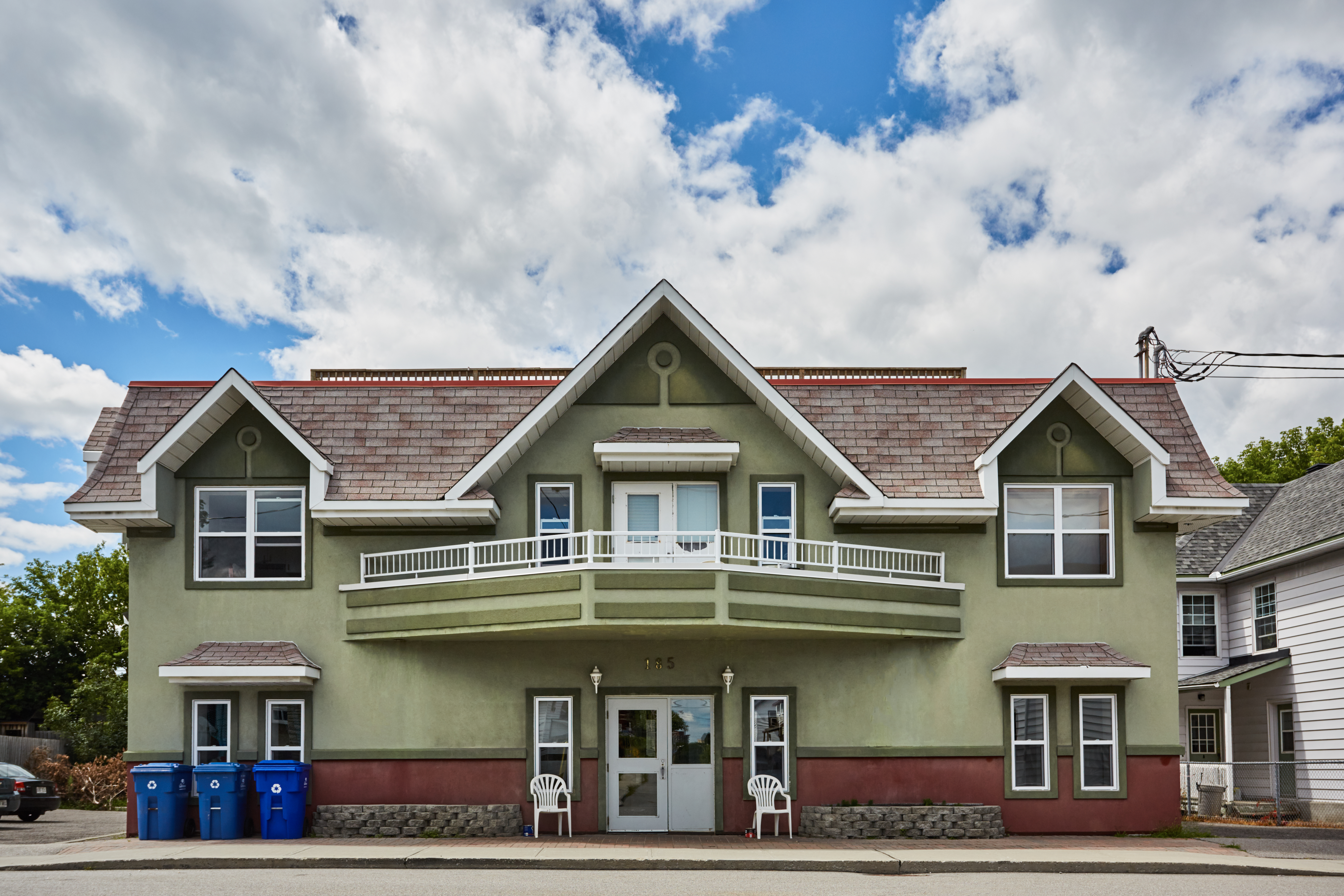 Ancien Cinéma de Paris, Mon Chez Nous ouvre son premier immeuble en 1999, au 185 rue Laval, Gatineau, QC.